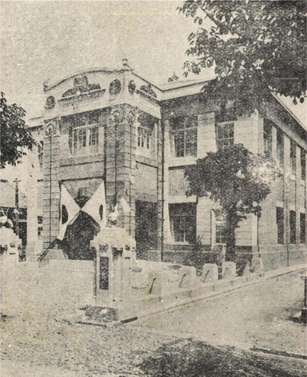 中文（台灣）: 桃園街役場，日治時期臺灣新竹州桃園街的地方行政機關。